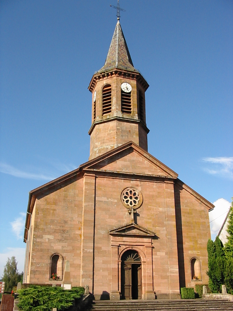 Bourg-Bruche, commune du bas-Rhin : l'église Saint-Pierre